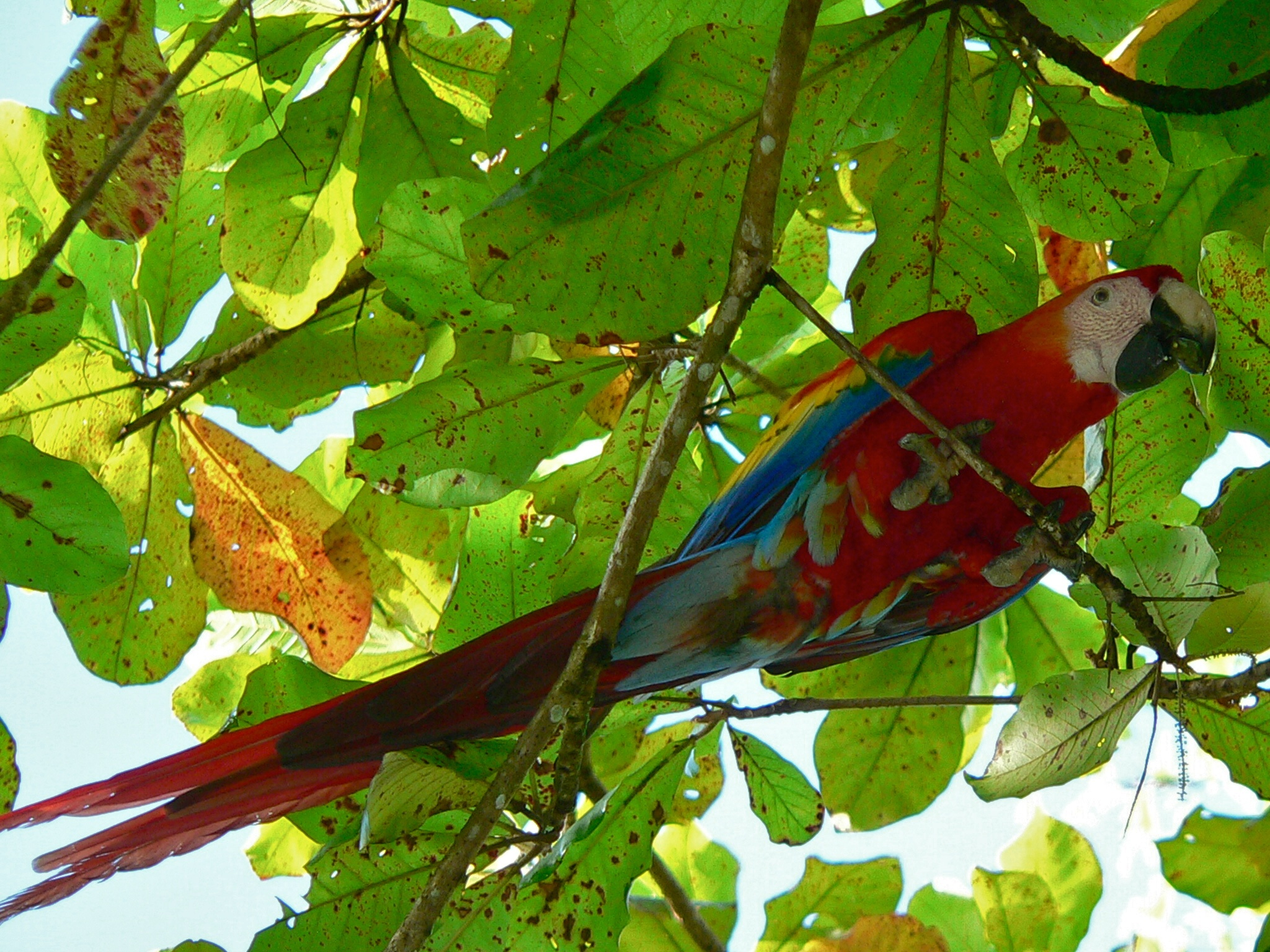 Puerto Jimenez, COSTA RICA